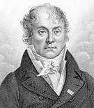 Antoine-Vincent Arnault, French dramatist